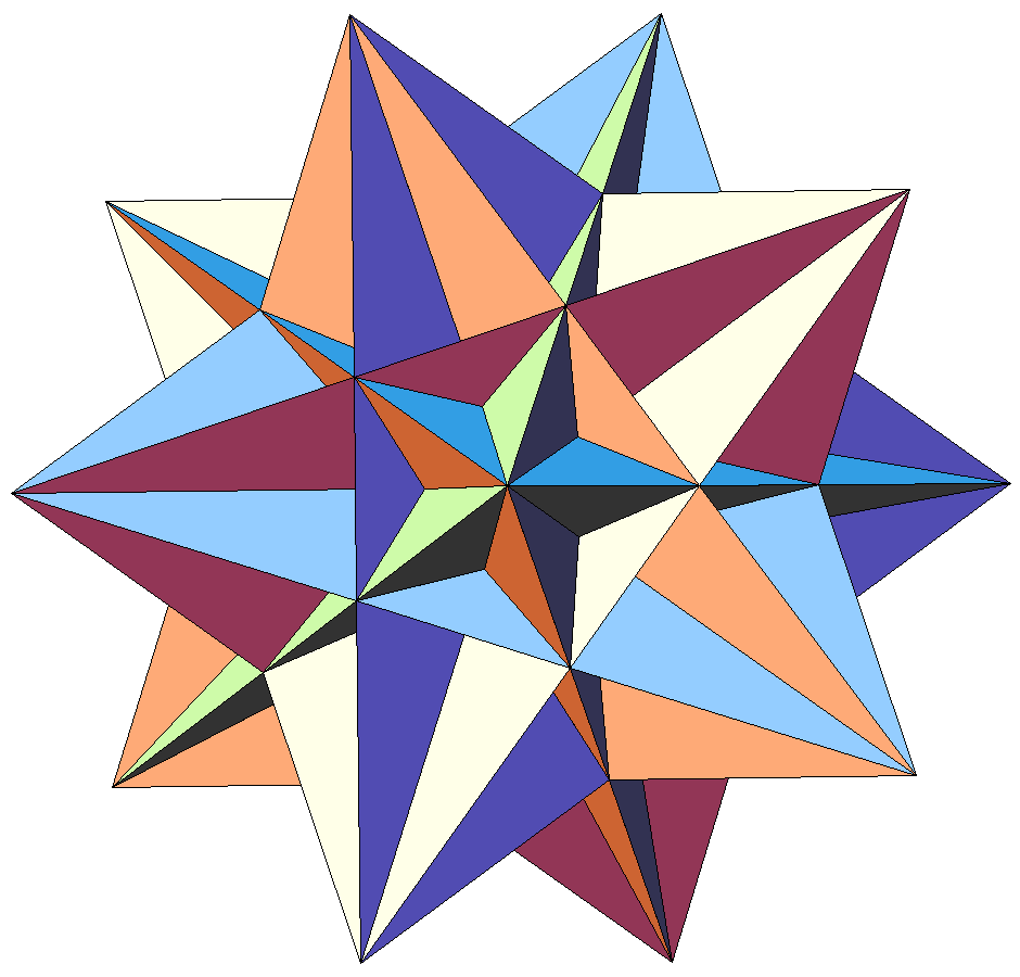 Шестнадцатая звёздчатая форма икосаэдра.